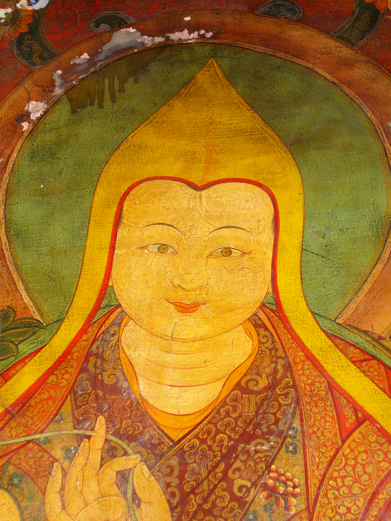 大昭寺